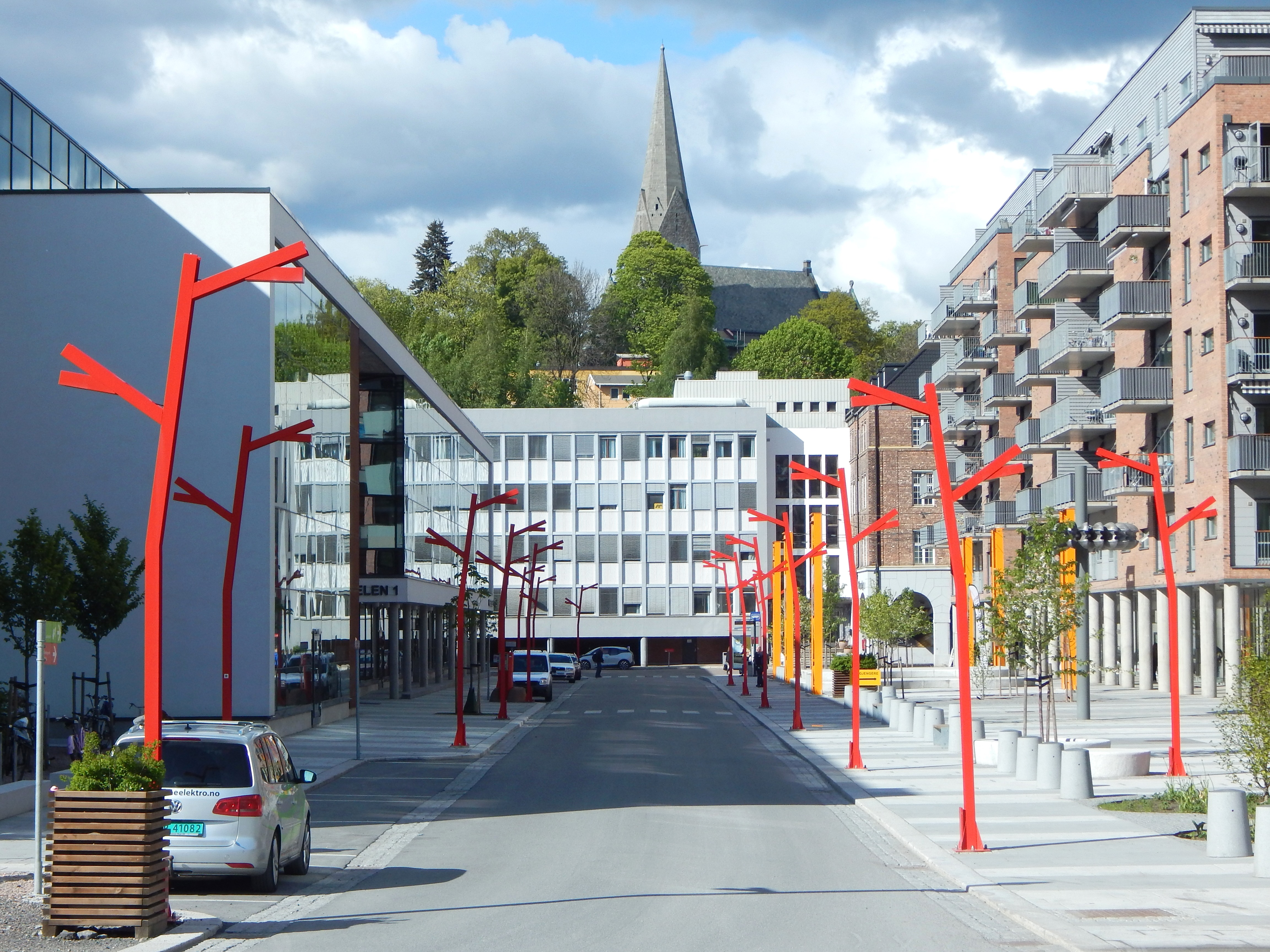 Gaten Smeltedigelen i Kværnerbyen